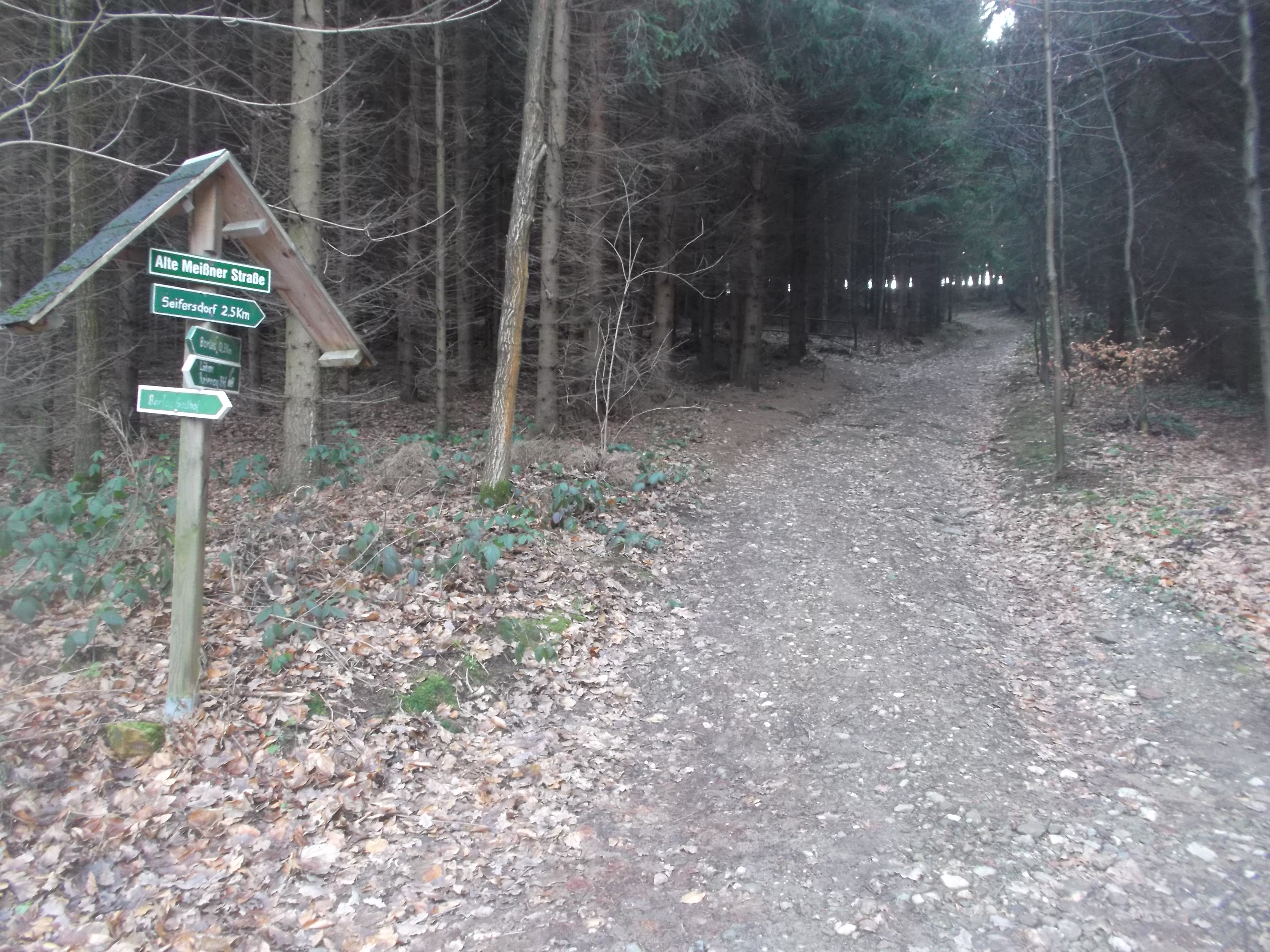 Alte Meißner Straße an der Kreuzung Straße nach Spechtritz bei Seifersdorf nahe Borlas